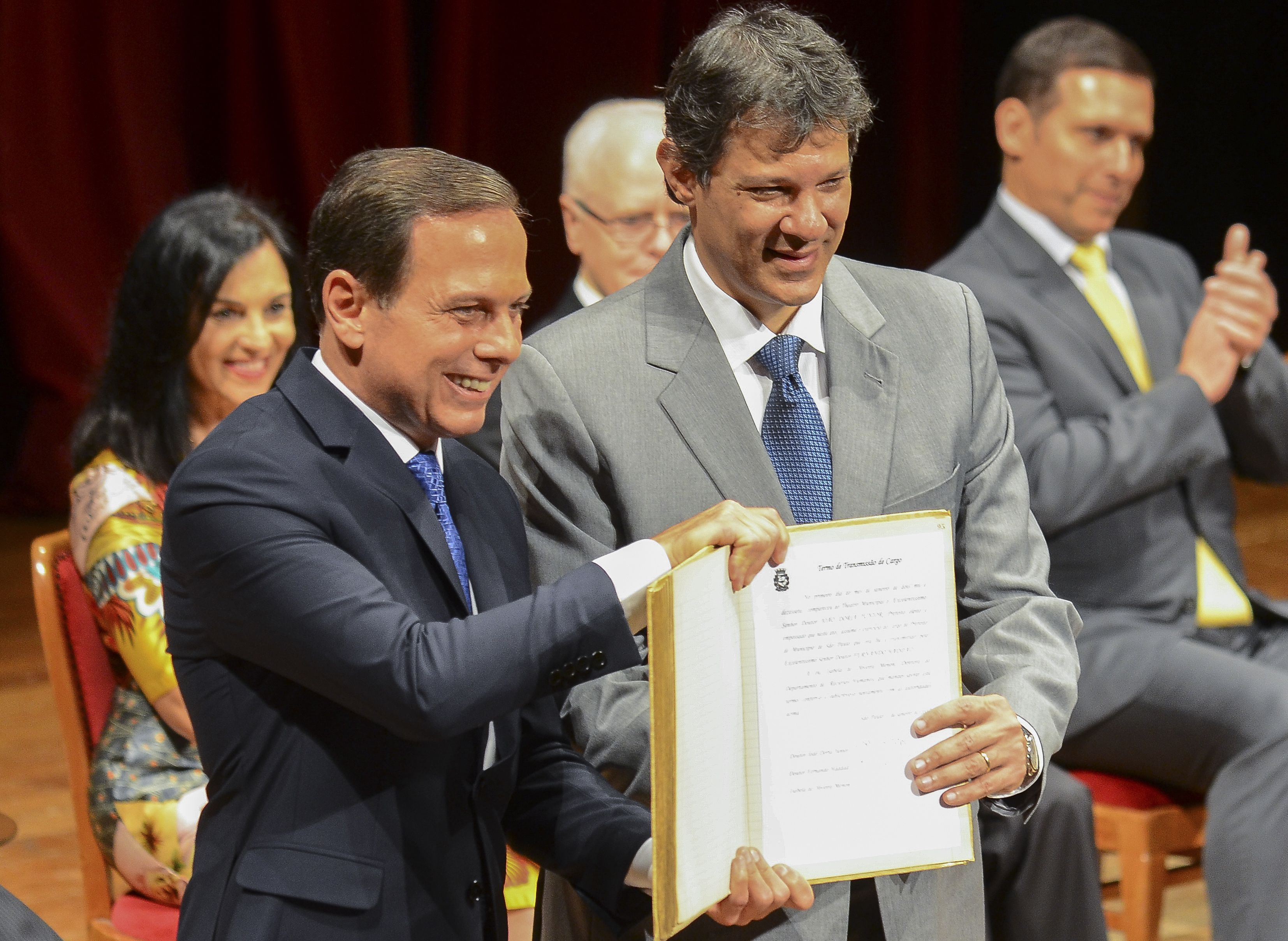 Fernando Haddad e João Doria seguram o documento de transmissão de cargo de prefeito de São Paulo, na cerimônia realizada no Theatro Municipal